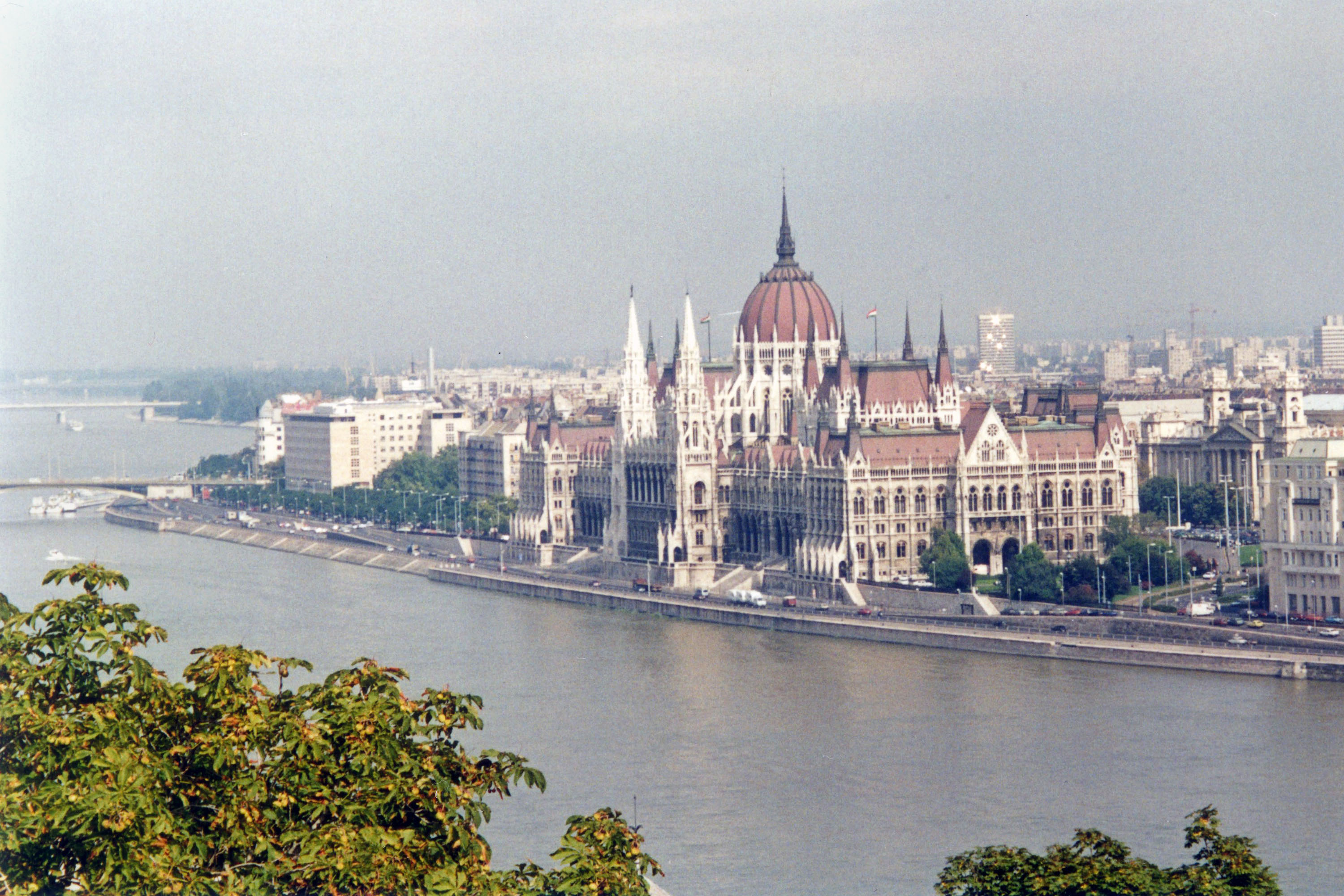 Hungarian Parliament Building in Budapest